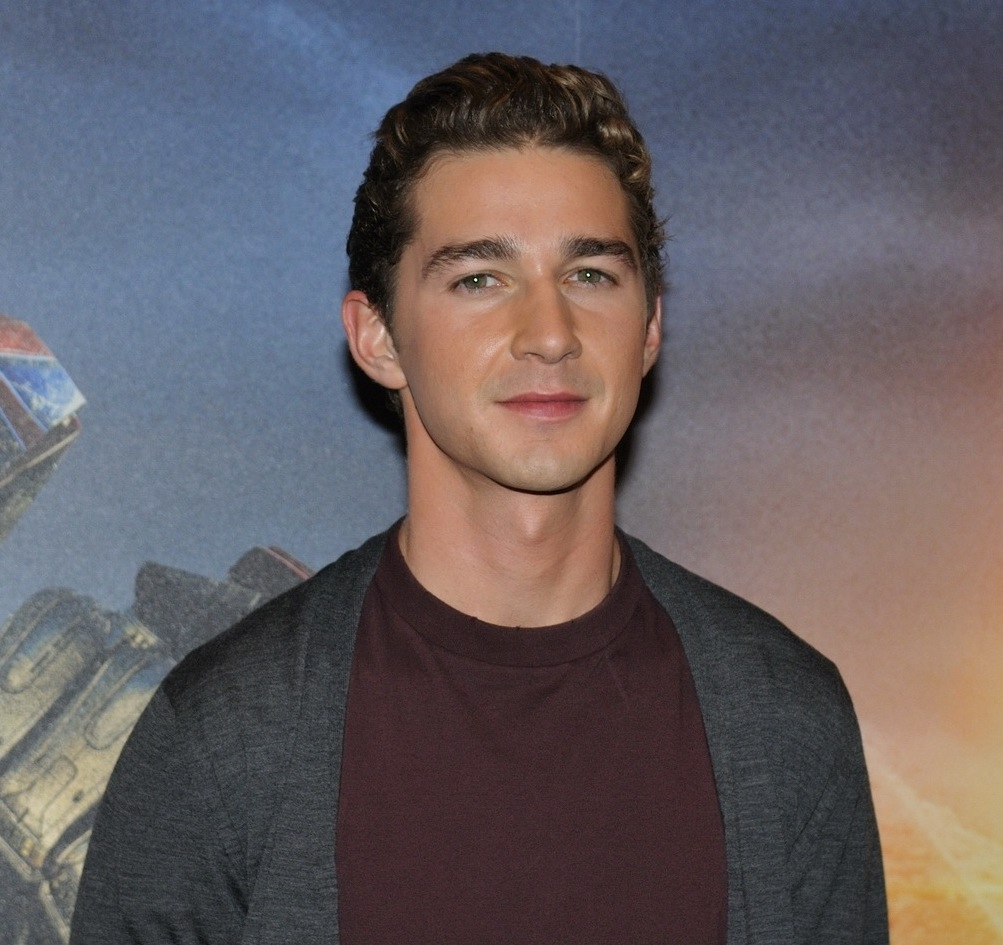 Acteur Shia LaBeouf, Megan Fox et Shia Labeouf au Georges V à Paris, pour la promo du film Transformers 2 : la revanche